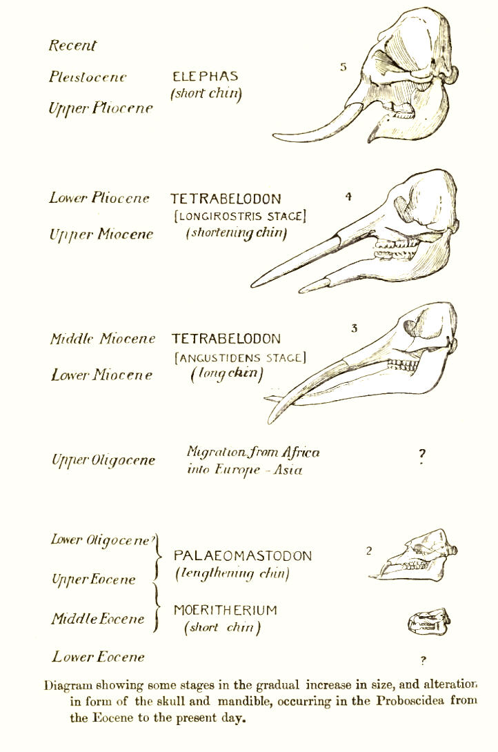 Elephant evolution